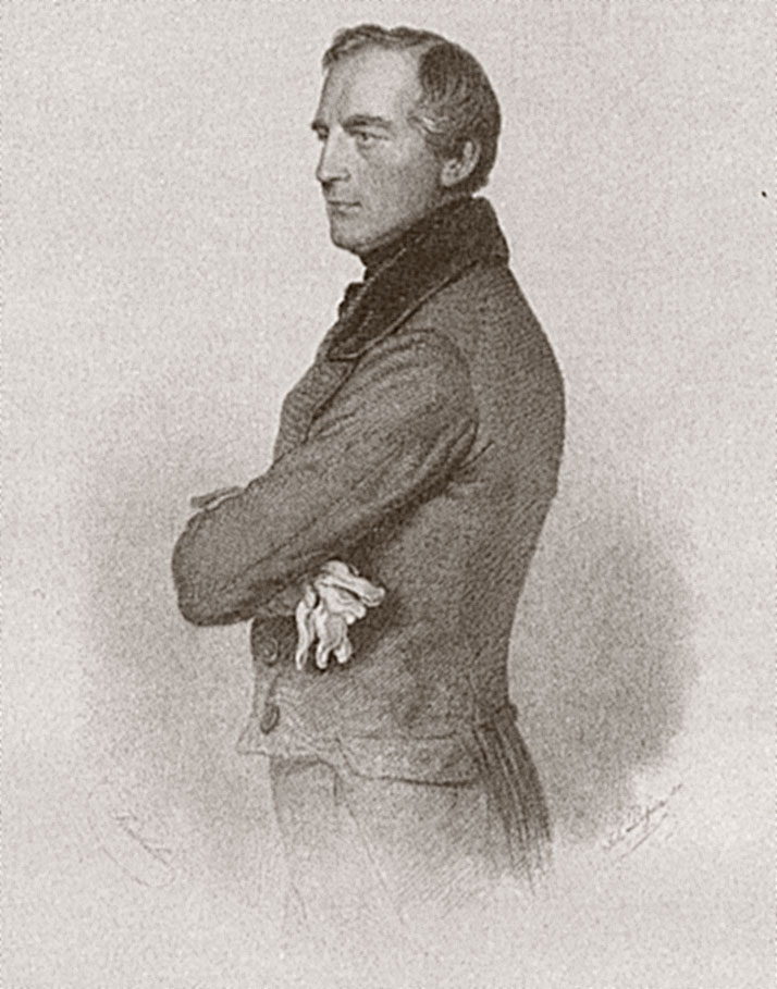 Karl Ludwig von Bruck, Stahlstich um 1860